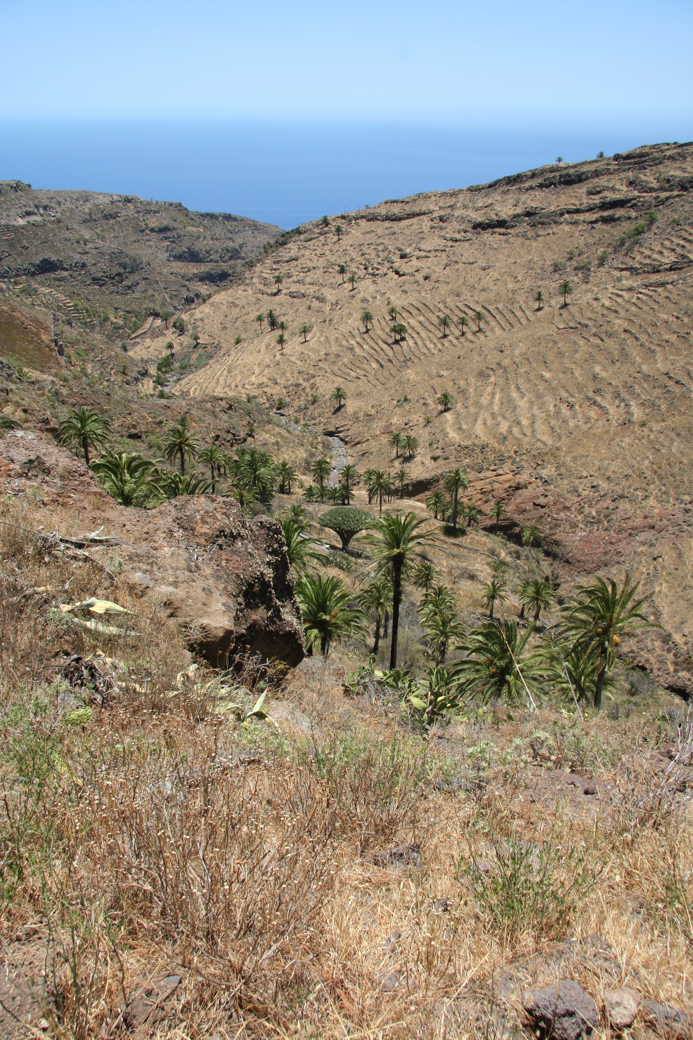 Der einzige wildwachsende Dracaena draco auf La Gomera